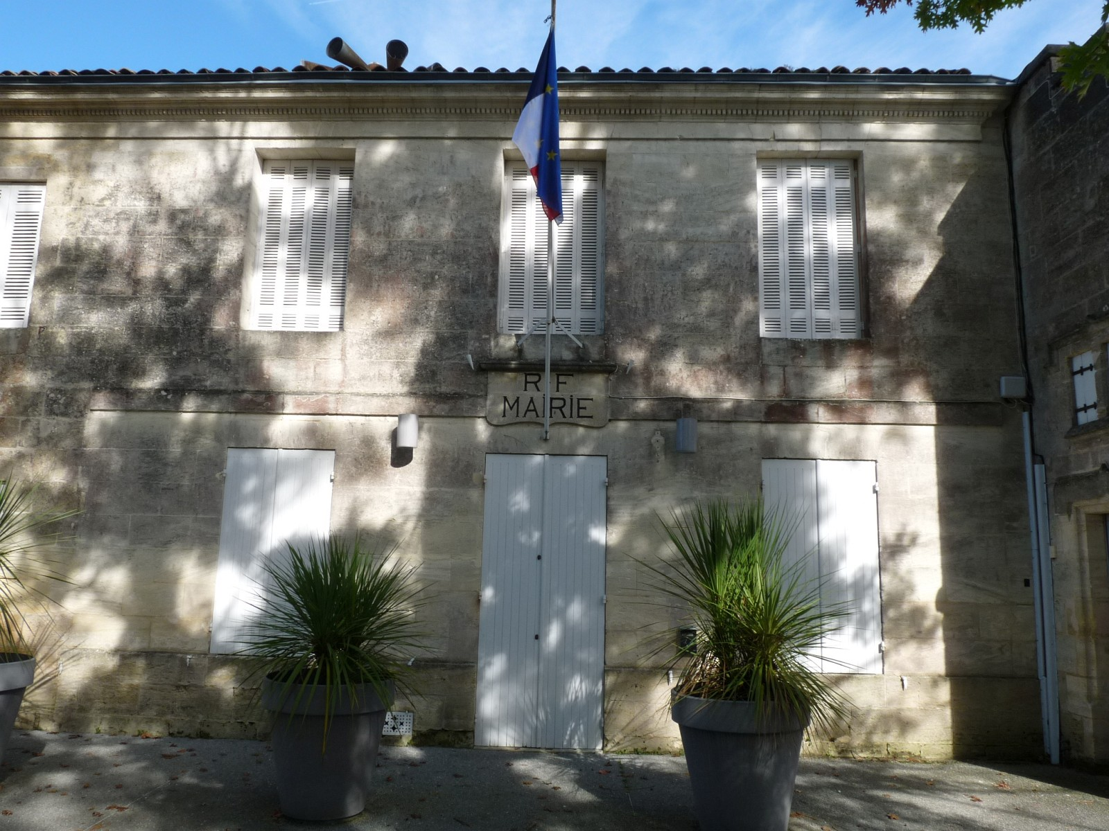 Mairie de Comps, Gironde, France